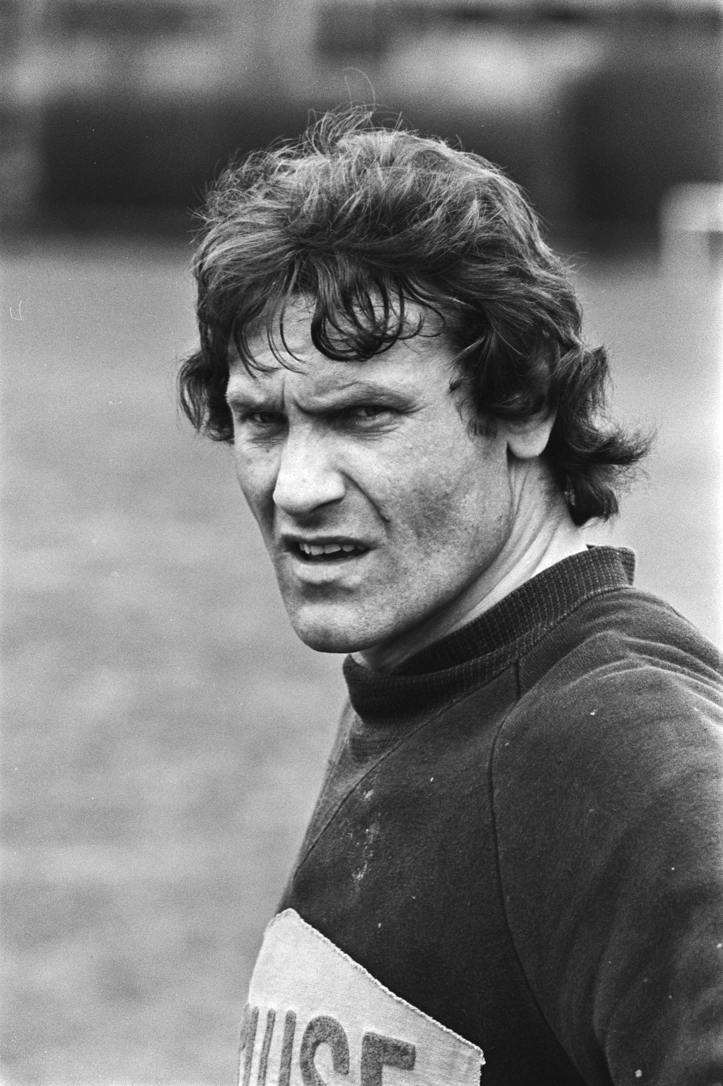 Collectie / Archief : Fotocollectie Anefo Reportage / Serie : [ onbekend ] Beschrijving : Training RWD Molenbeek , Brussel; i.v.m. wedstrijd tegen Feijenoord op 2/3 a.s. Keeper Nico de Bree , kop Datum : 23 februari 1977 Locatie : Brussel Trefwoorden : sport, voetbal Persoonsnaam : Bree, Nico de Instellingsnaam : Feyenoord Fotograaf : Verhoeff, Bert / Anefo Auteursrechthebbende : Nationaal Archief Materiaalsoort : Negatief (zwart/wit) Nummer archiefinventaris : bekijk toegang 2.24.01.05 Bestanddeelnummer : 929-0436